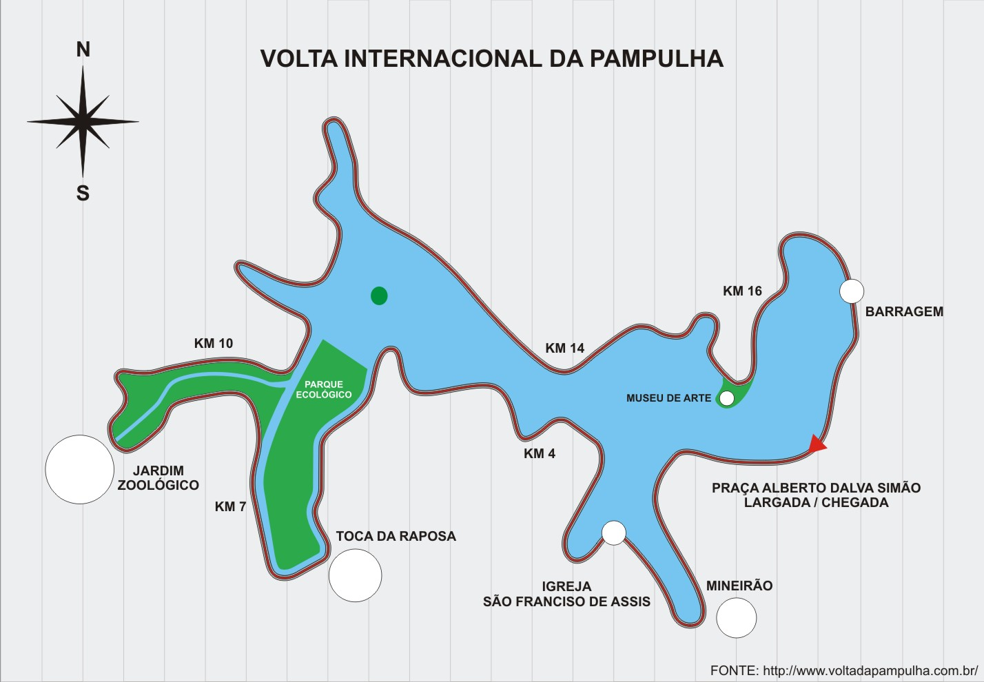 Reprodução do trajeto realizado na Volta Internacional da Pampulha.